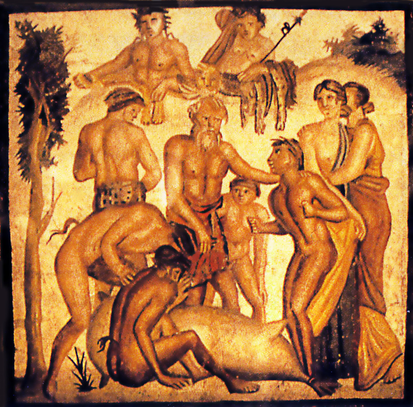 Jeu de l'outre, mosaïque romaine, Pergamon Museum à Berlin.